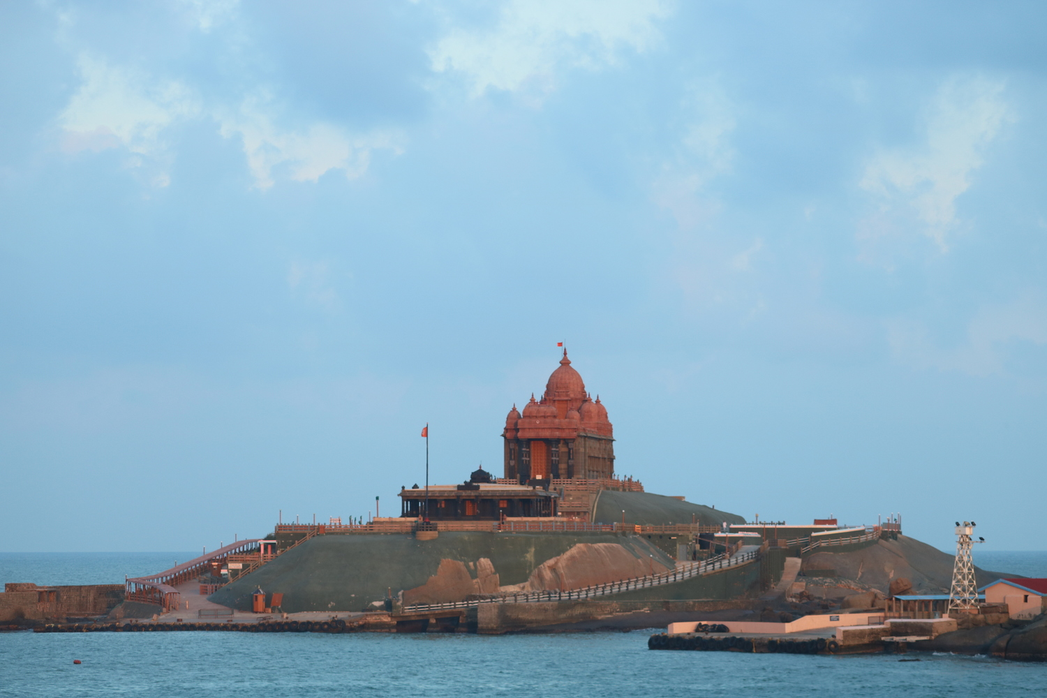 കന്യാകുമാരിയിലെ വിവേകാനന്ദപ്പാറ